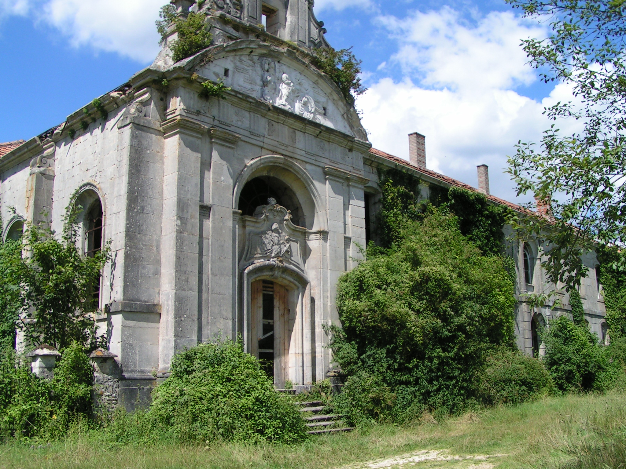 Façade principale de l'abbaye de l'Etanche, Meuse. La source de cette photo est moi même, Francis MONTIGNON.